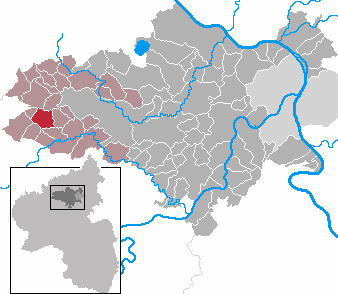 Nachtsheim in Rhineland-Palatinate - district Mayen-Koblenz